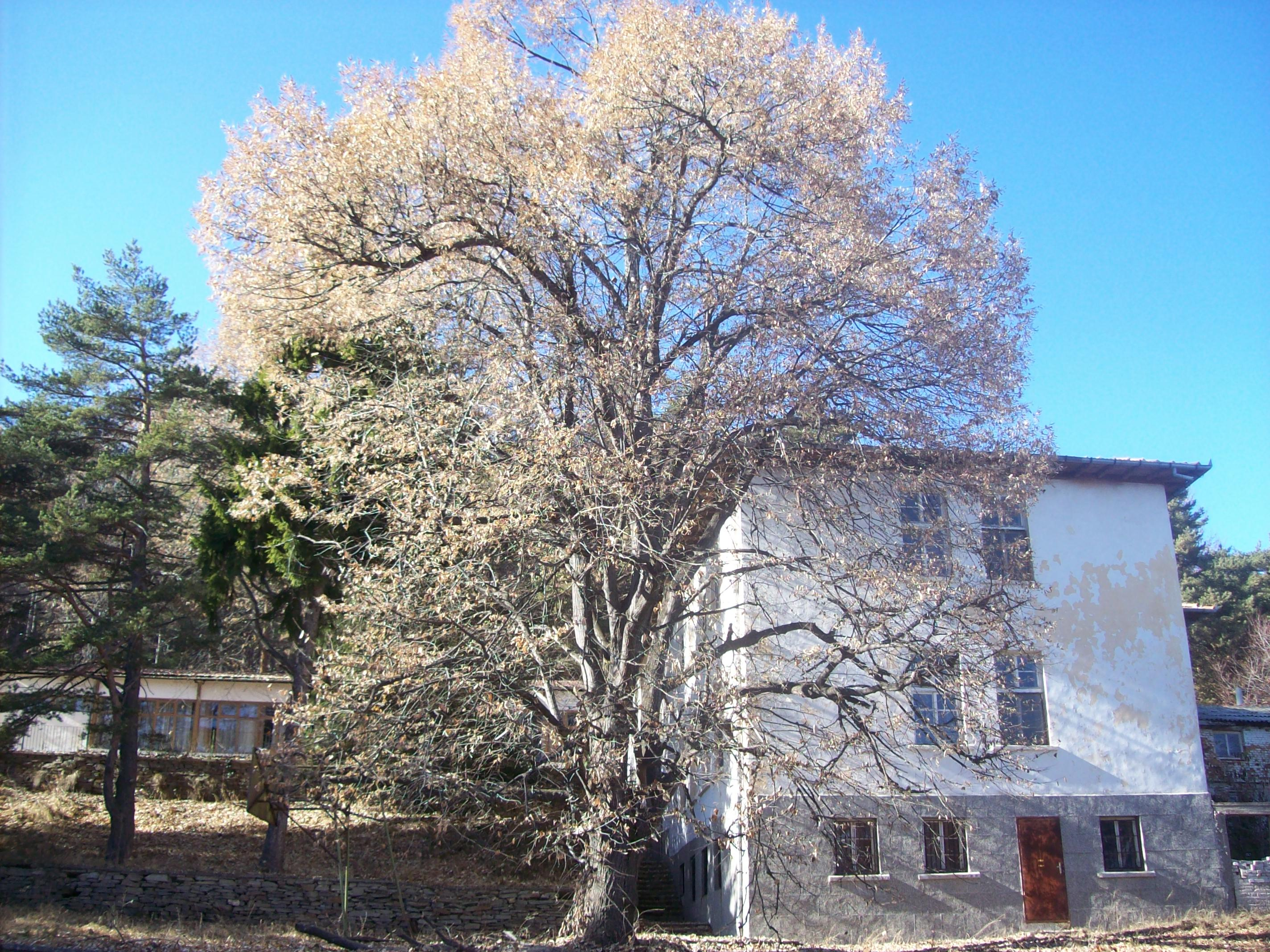 Лагерът Майчина Грижа в покрайнините на селото, Бойково